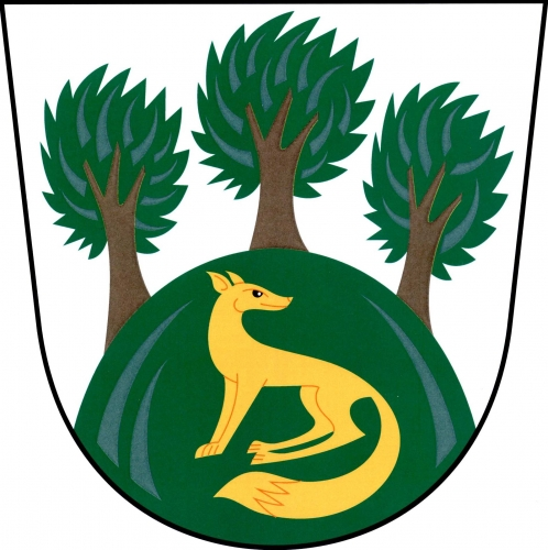 znak, Vícenice, okres Třebíč